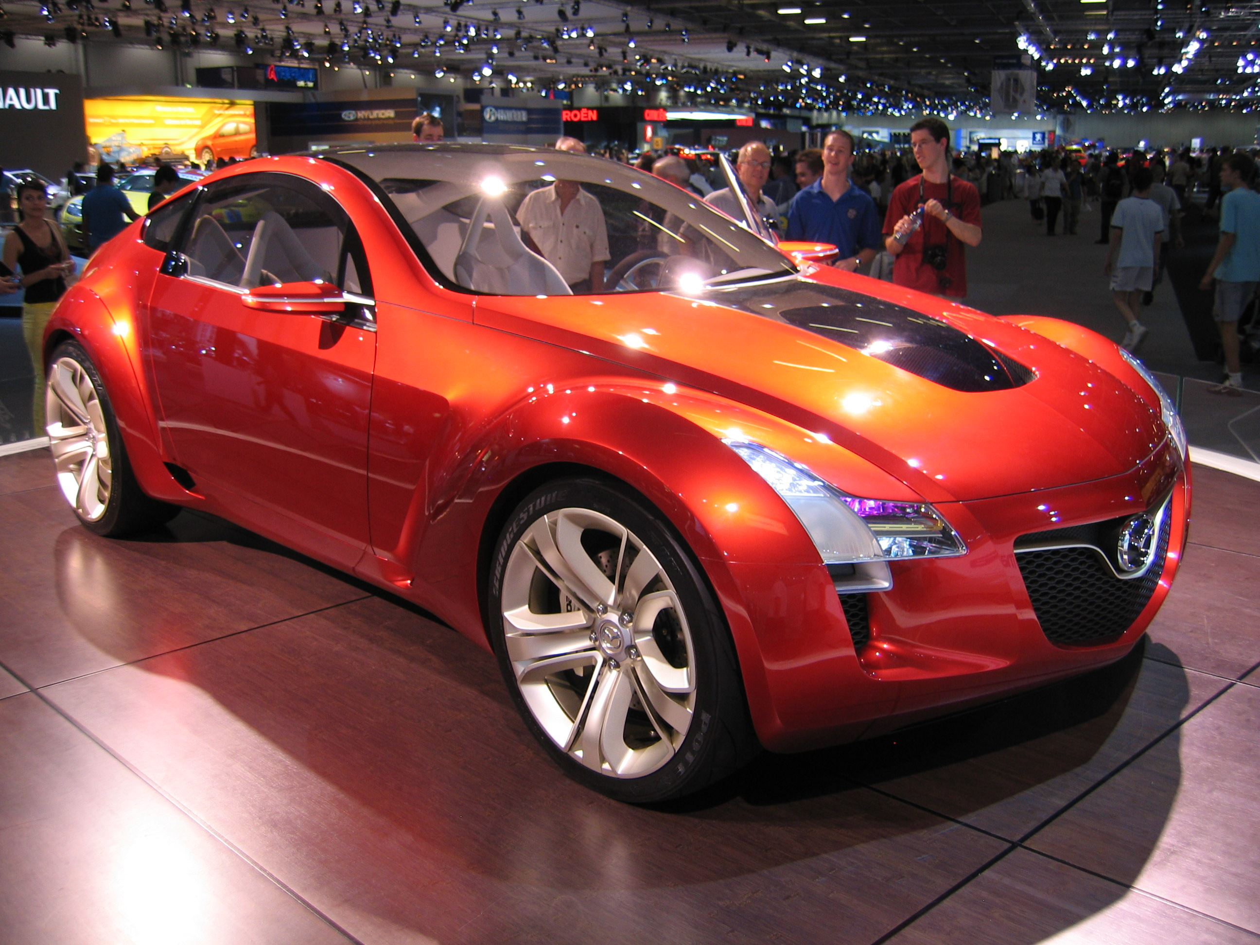 Mazda Concept Car